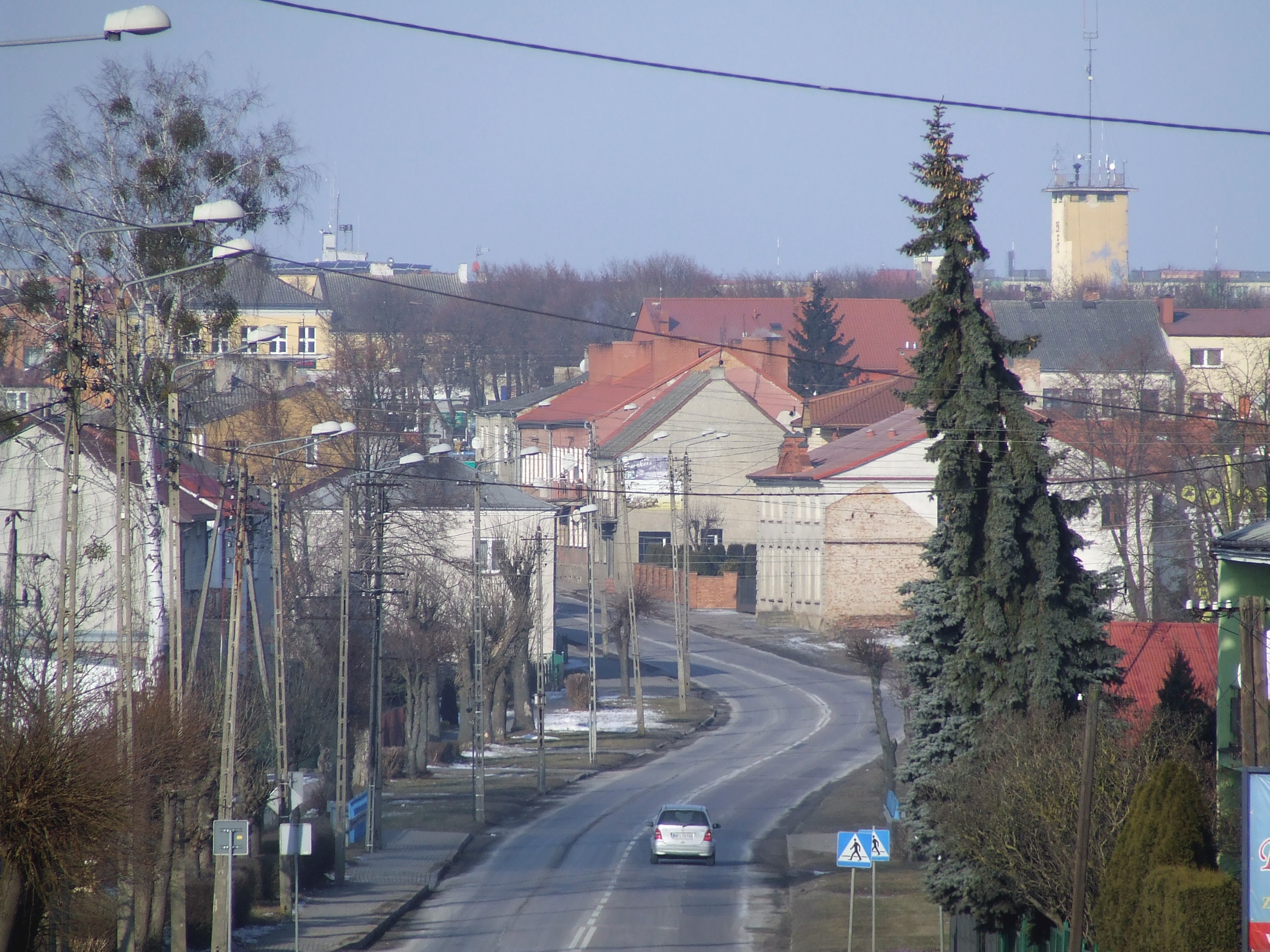 Kolno ul. Księcia Janusza (droga krajowa nr. 63)